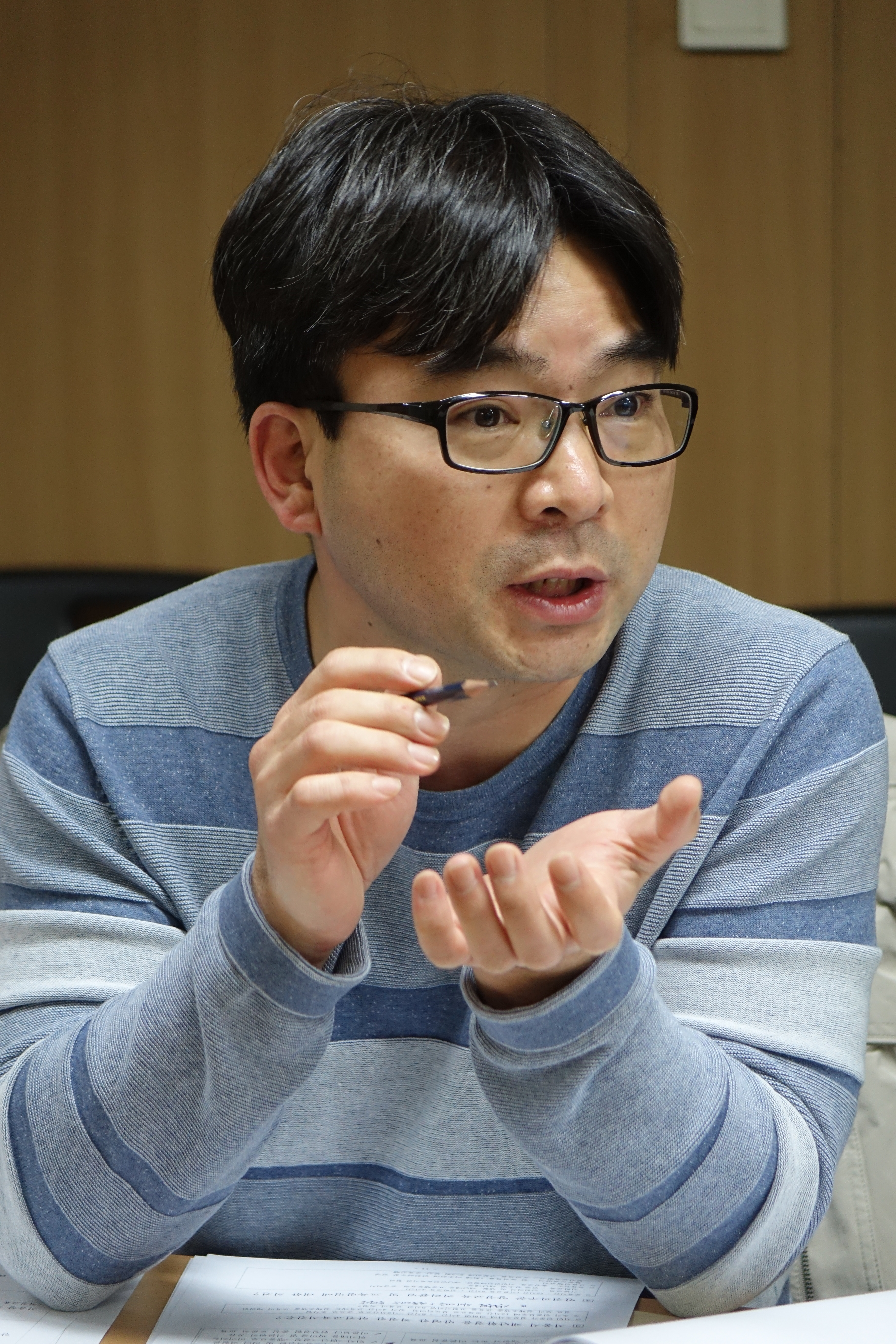 최삼호, 2015년 4월 서울특별시 중구 서울소방재난본부 시민안전파수꾼 자문위원 회의